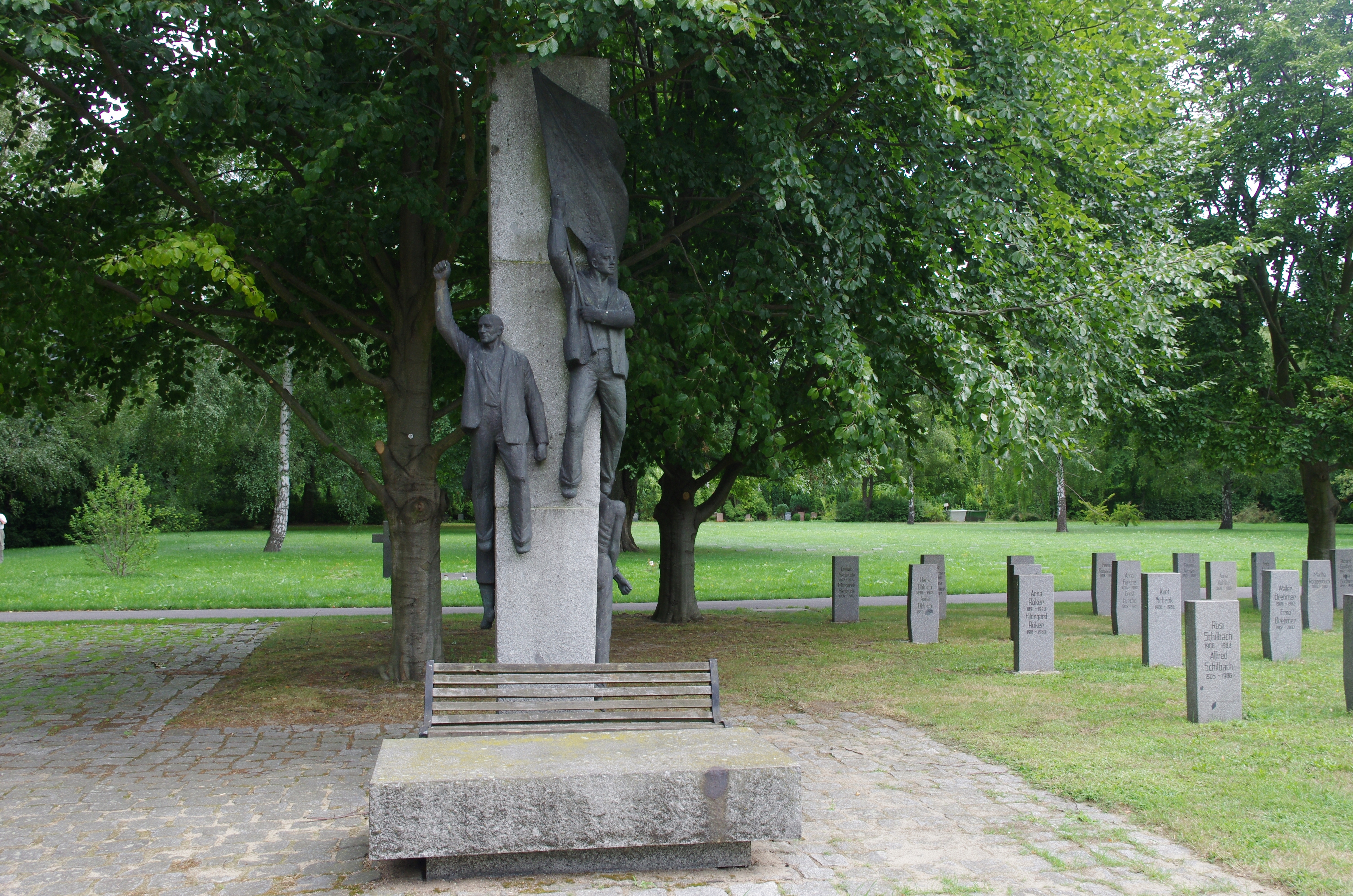 Baumschulenweg in Berlin. Der Friedhof steht unter Denkmalschutz. Hier das Denkmal der Antifaschischten.